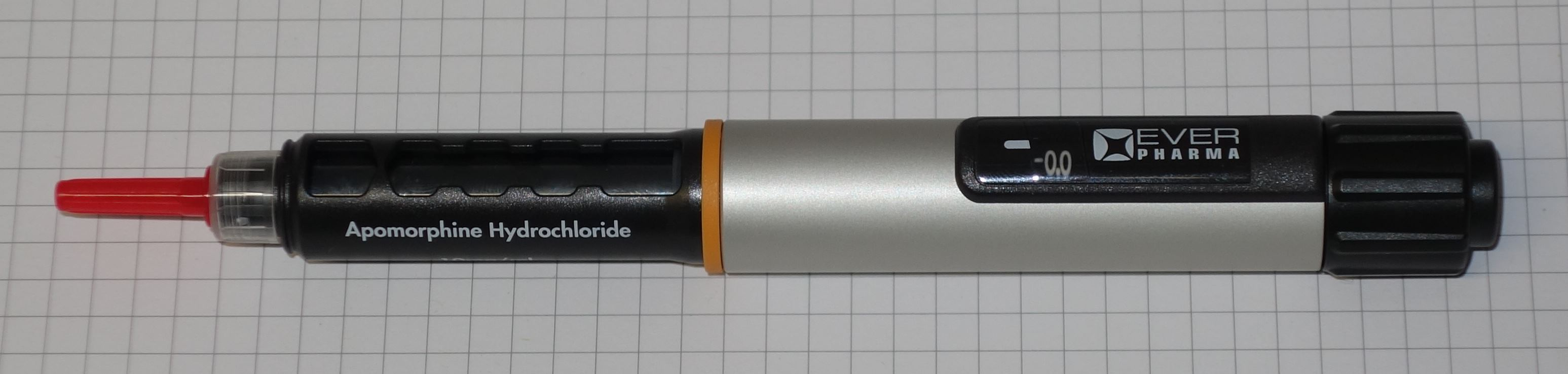 Pen zur Injektion von Apomorphin mit Kanüle